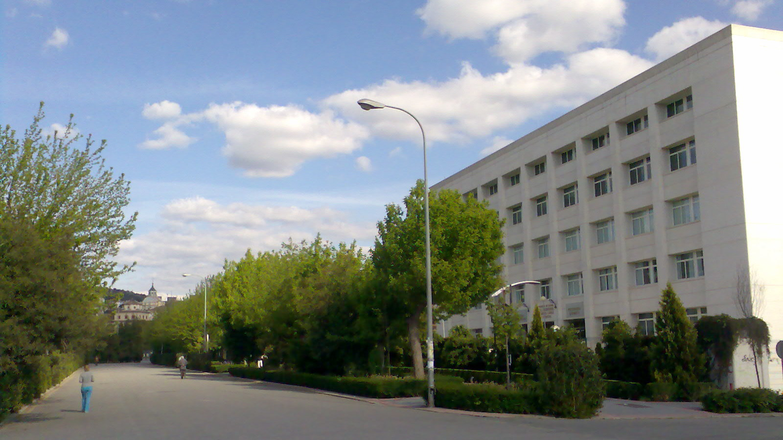 Escuela de Ingenieros de Caminos, Canales y Puertos de Granada. También se ve en la imagen los Paseillos universitarios, unos jardines anexos.